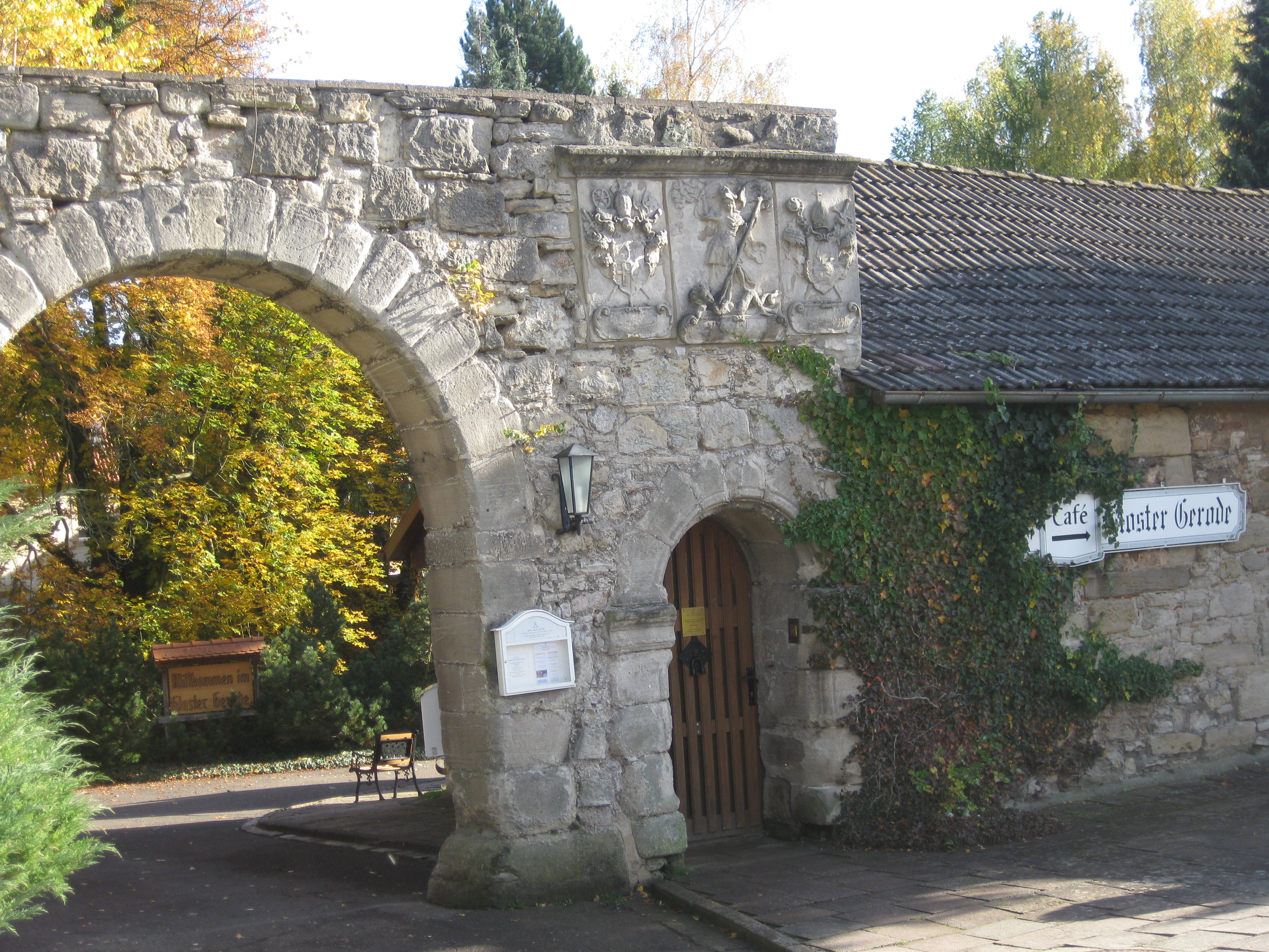 Eingang zum ehemaligen Kloster Gerode